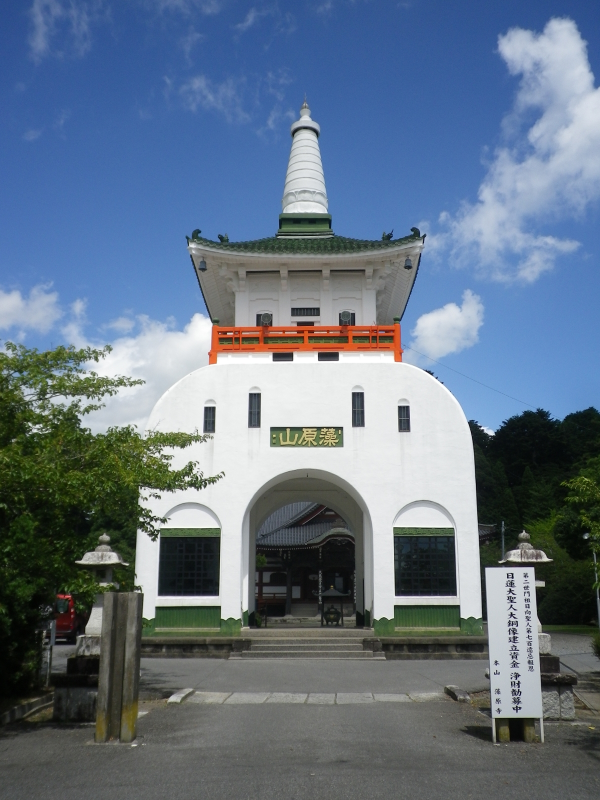 藻原寺山門